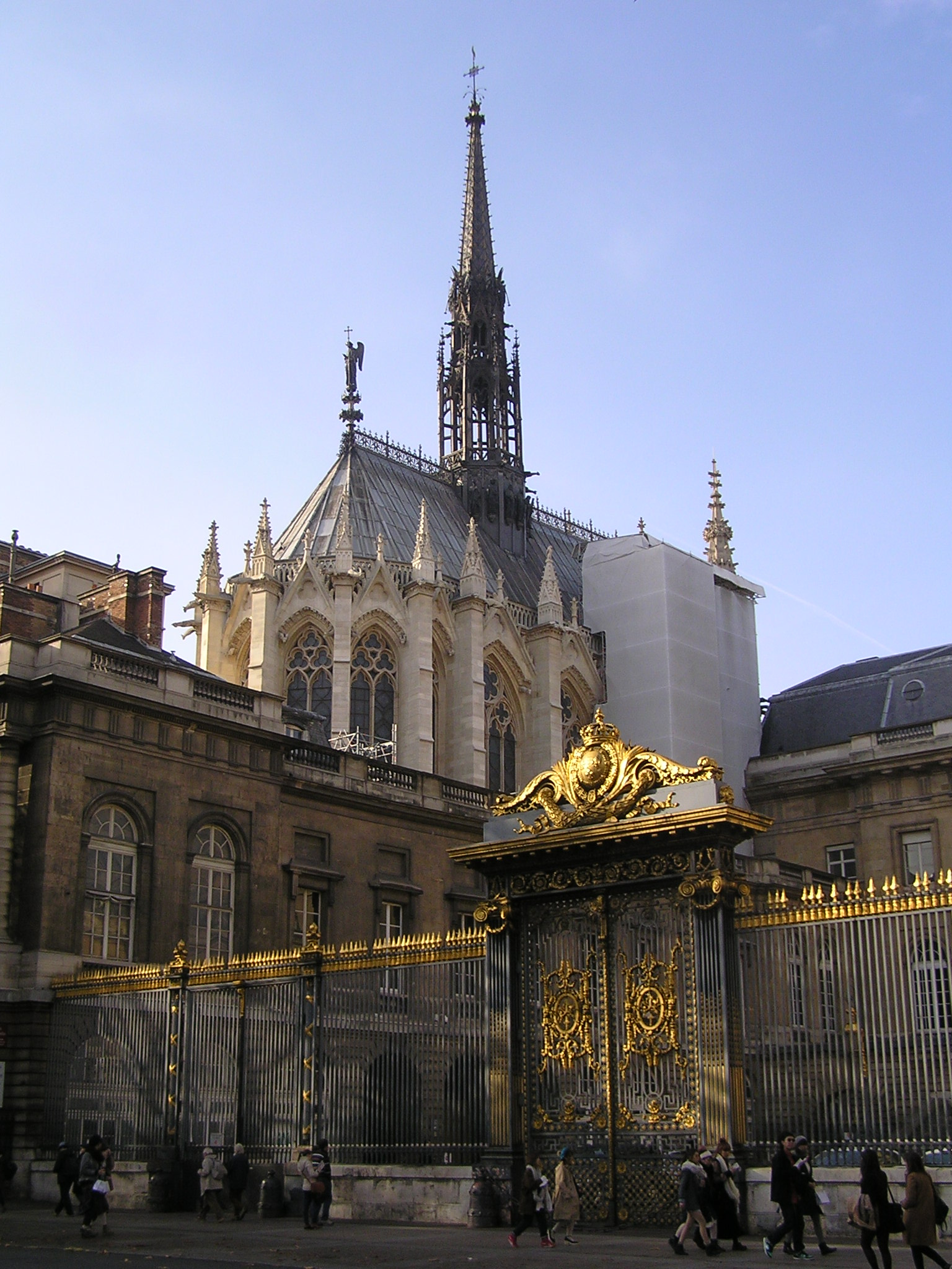 Construite entre 1241 et 1248 à la demande de Saint-Louis pour abriter des reliques du Christ. .